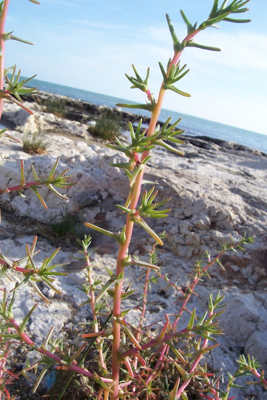 Salsola soda Rignanese